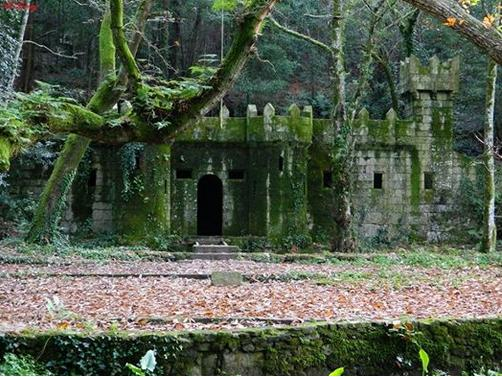 Castelodo Frendoal no rio Orxas